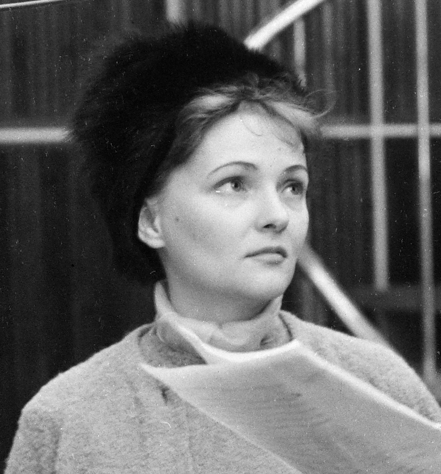 Örkényi Éva magyar színésznő.